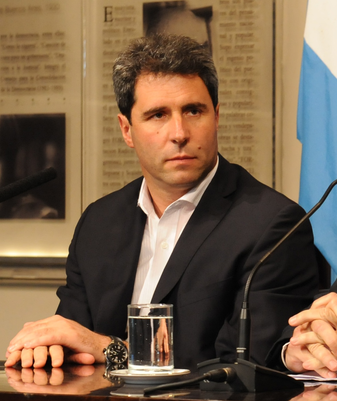 Sergio Uñac en Casa Rosada.